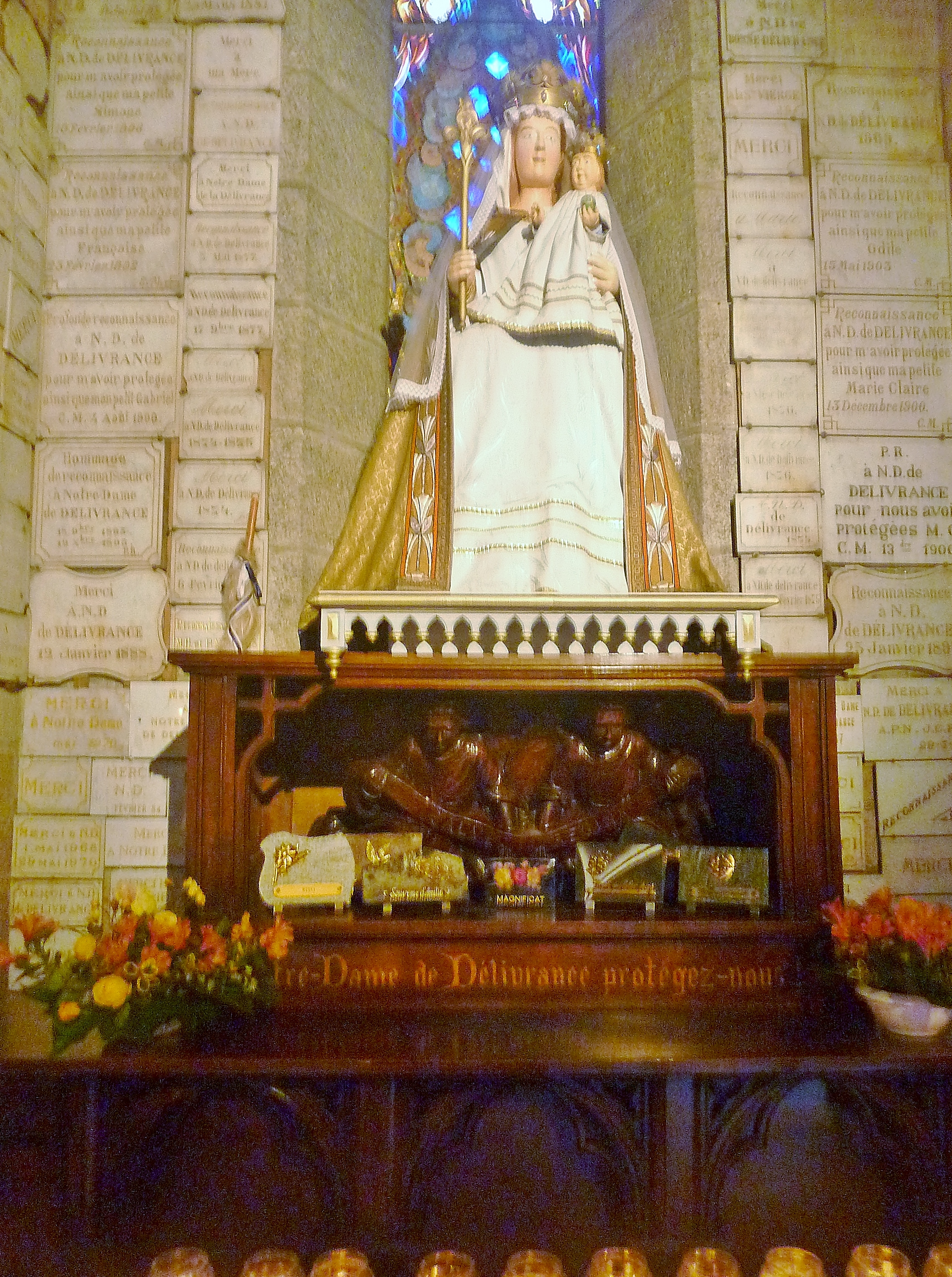 Vierge à l'Enfant, statue de Notre-Dame-de- Délivrance et ses ex-votos à Quintin (Côtes-d'Armor).